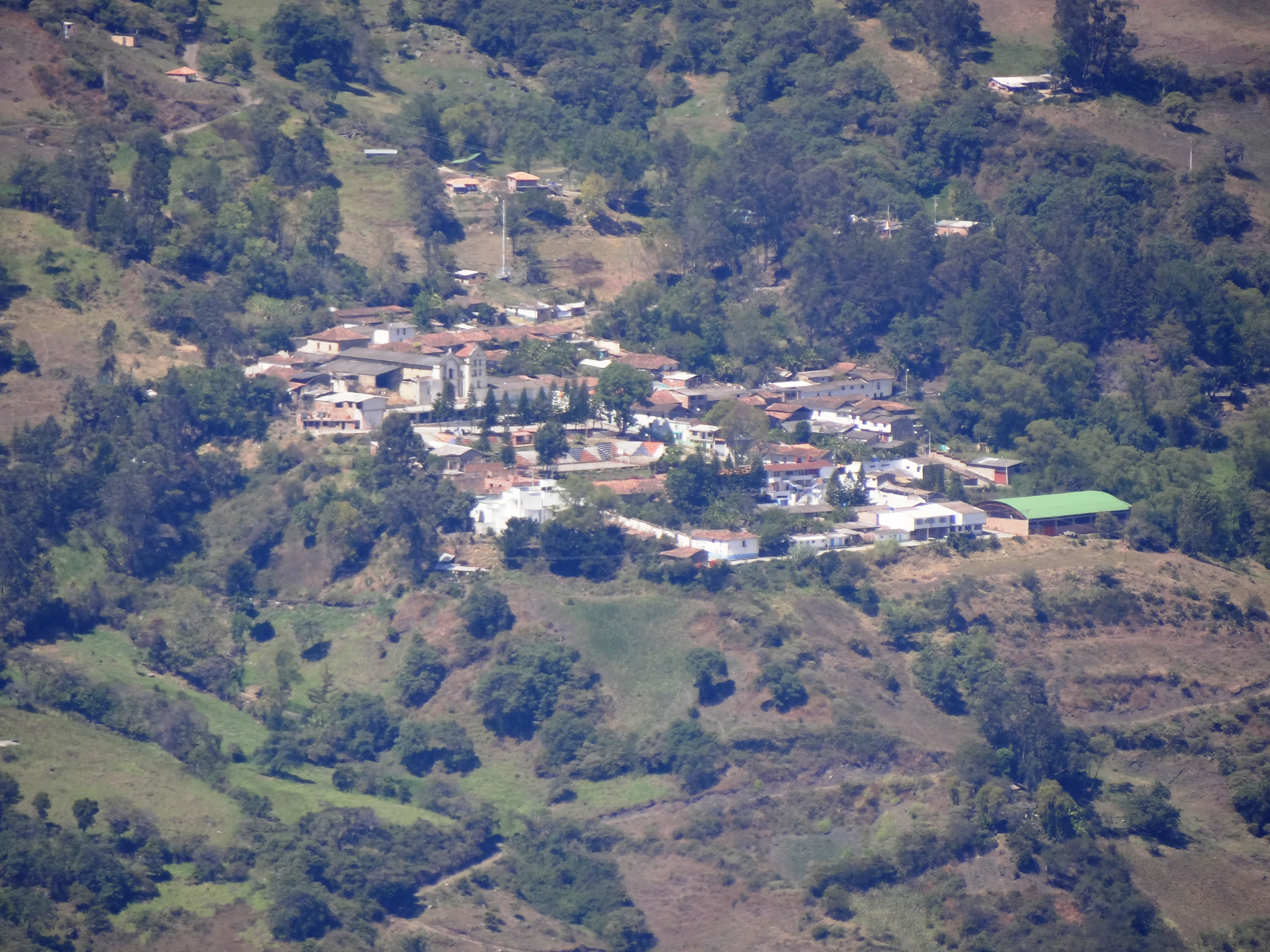 Área urbana del municipio de Macaravita, departamento de Santander, Colombia